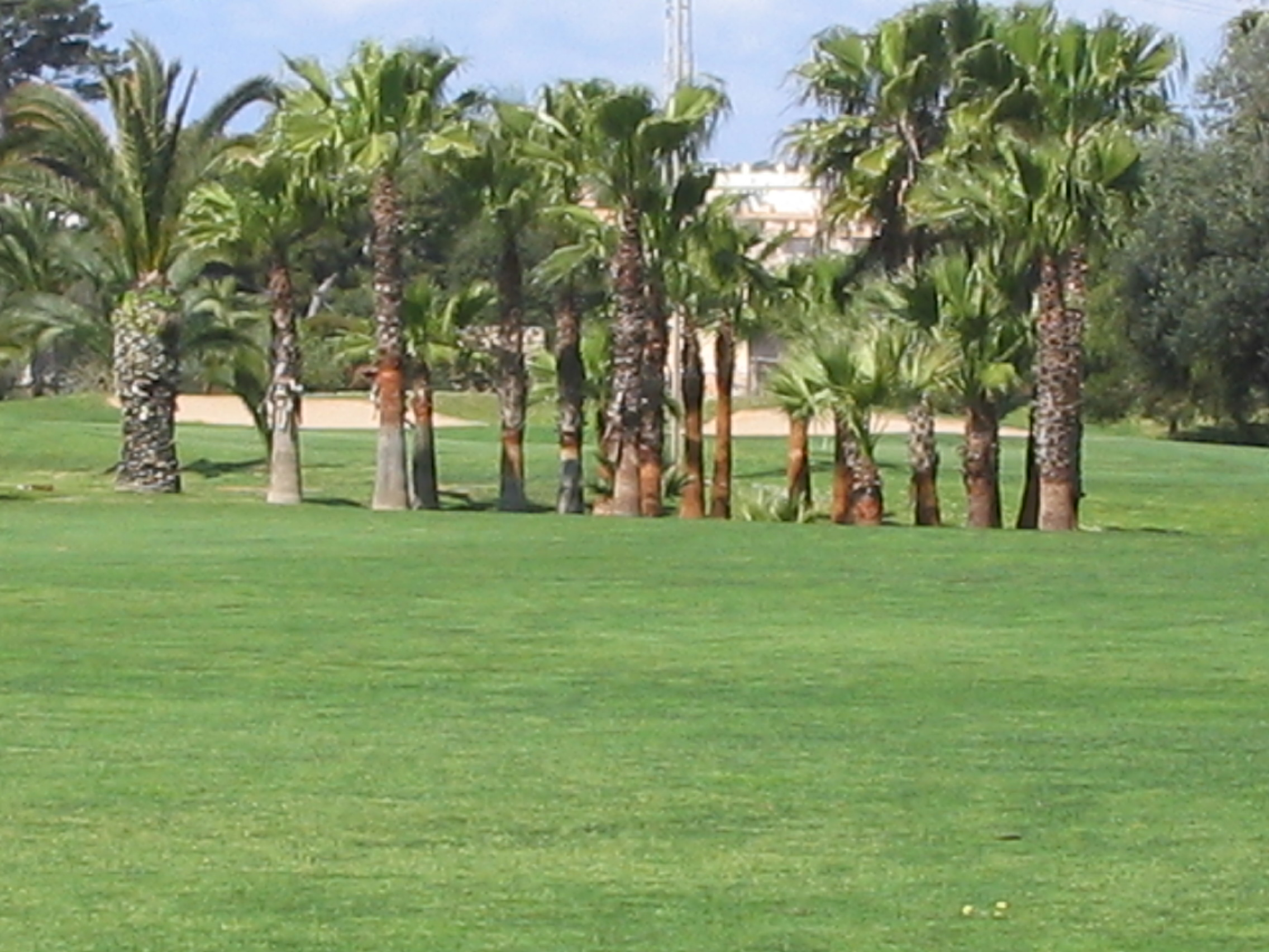 Palm trees